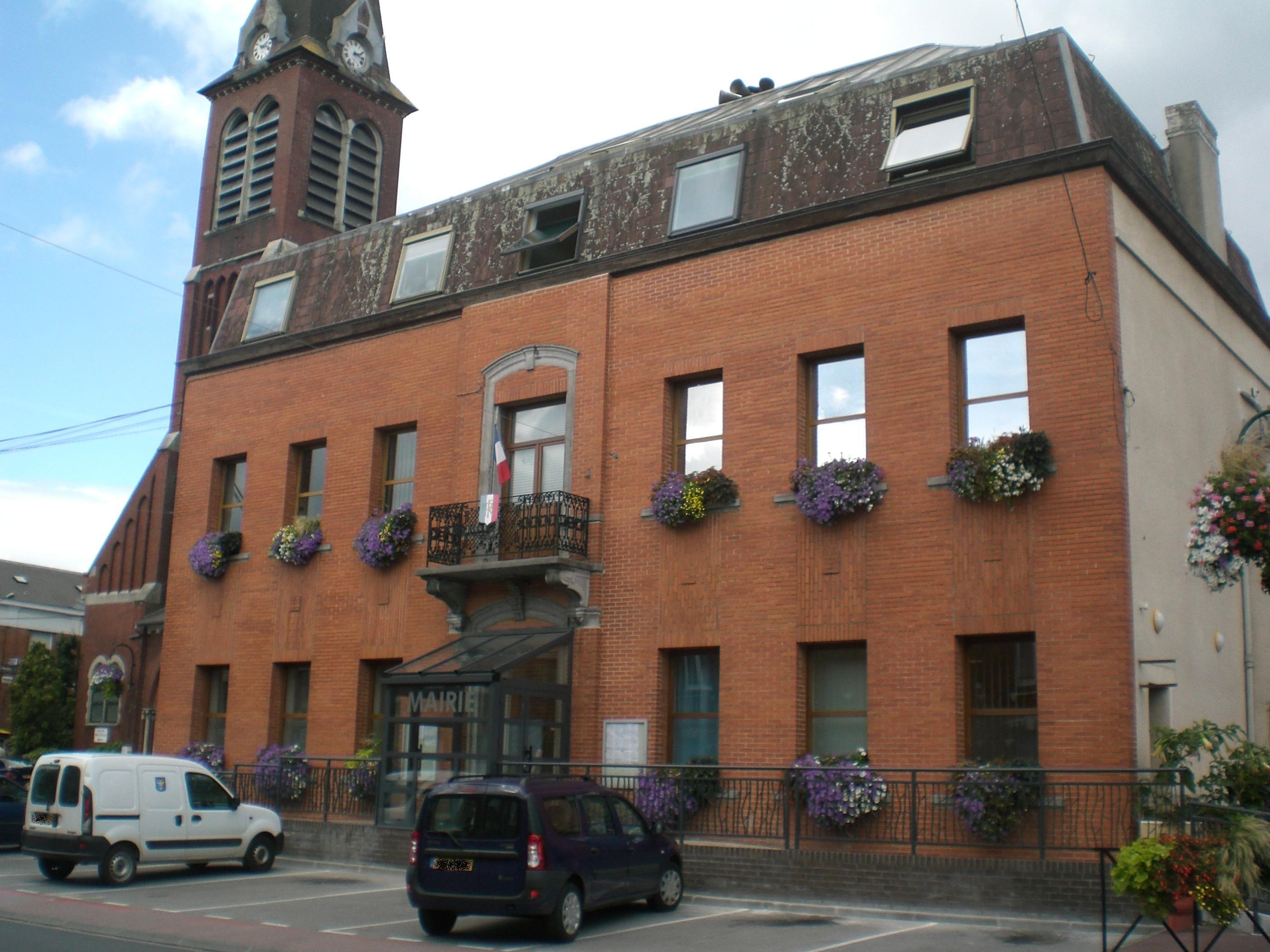 mairie de Louvroil (Nord) france